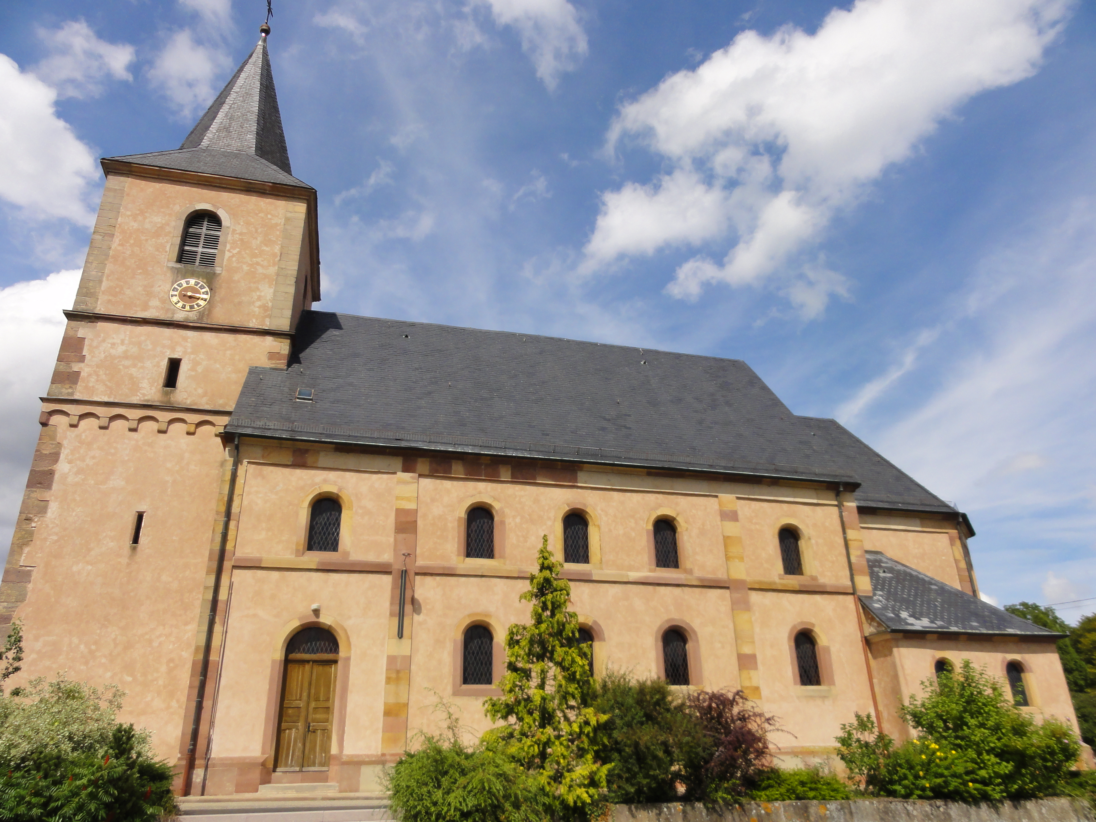 Alsace, Bas-Rhin, Preuschdorf, Église simultanée Saint-Adelphe